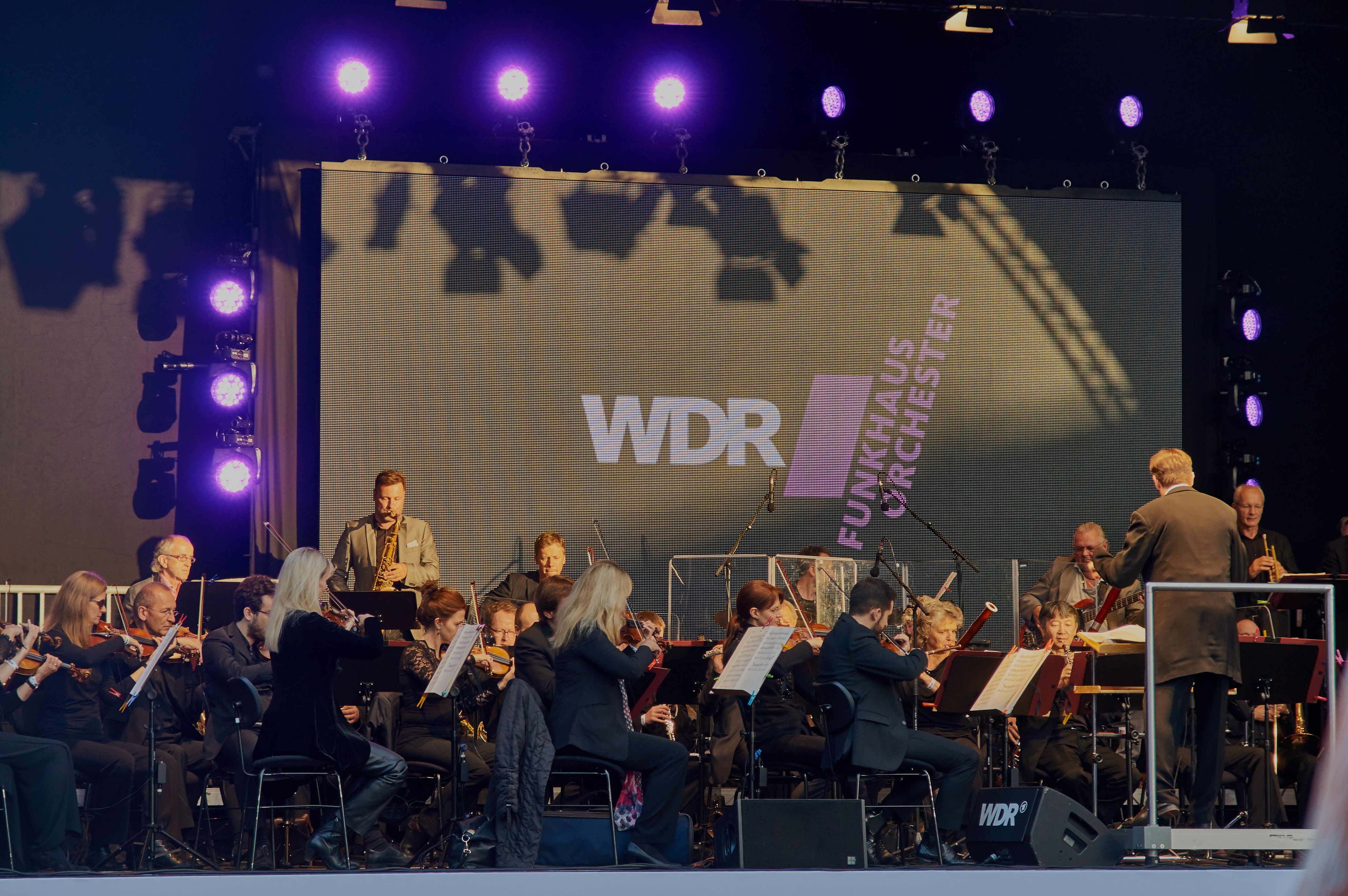 Das WDR Funkhausorchester Köln unter Eckehard Stier am 1. Juli 2017 auf der Aasee-Bühne in Münster.